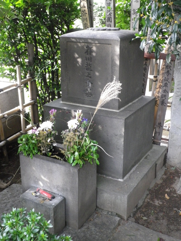 芥川龍之介の墓